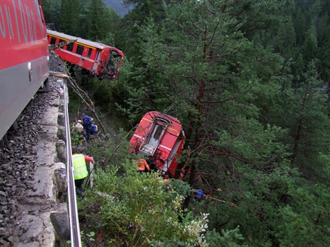 Am 13. August 2014 wurde ein mit etwa 140 Personen besetzter Zug der Rhätischen Bahn von Tiefencastel in Richtung Thusis. Zwischen den Tunnels Salons und Mistail wurde er von einem Erdrutsch erfasst. Drei Personenwagen entgleisten. Einer davon rutschte vom Bahntrassee ab und kam nach zehn Metern in den Bäumen zum Stillstand. Fünf Personen wurden schwer, sechs Personen leicht verletzt.